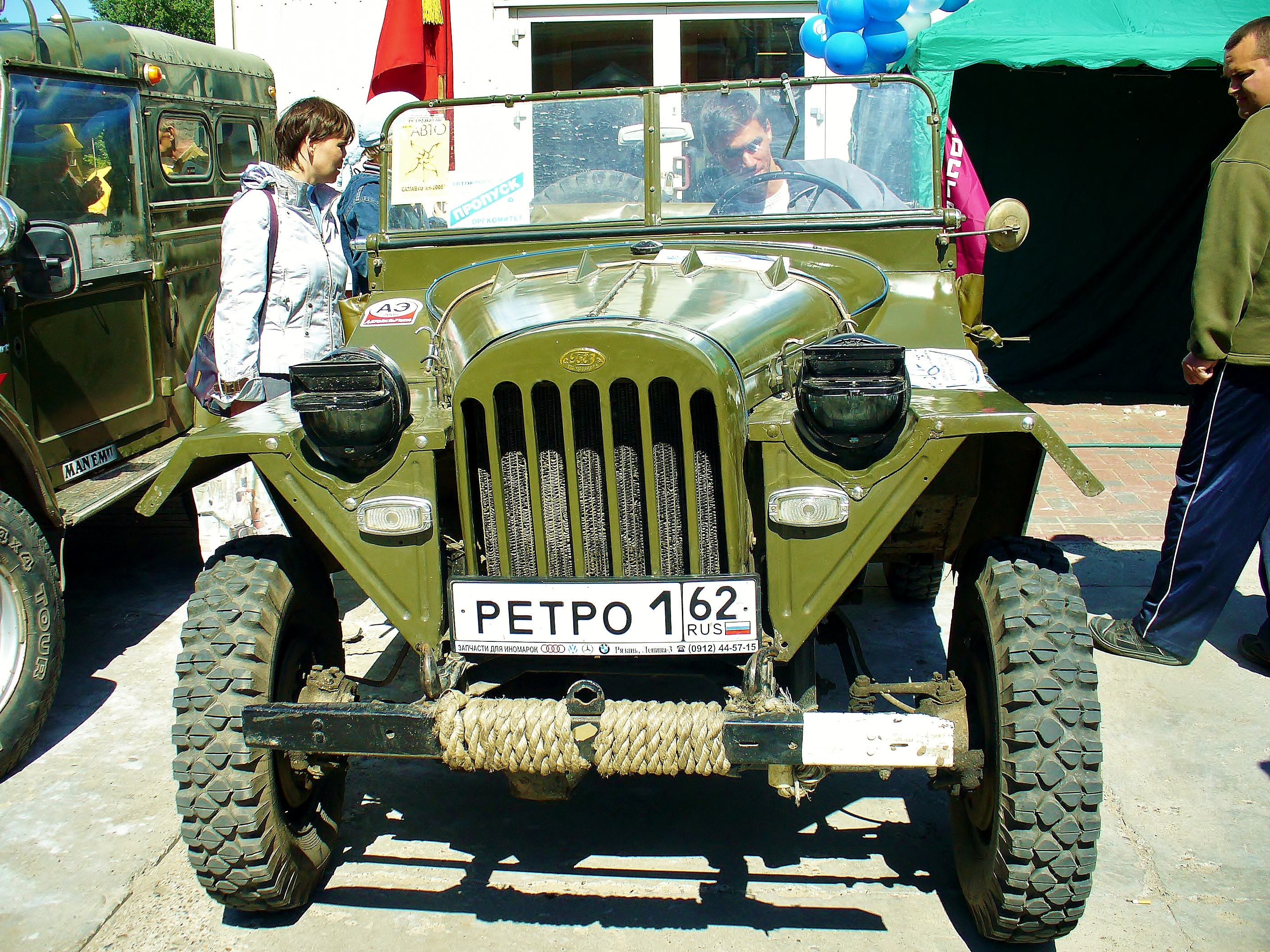 Газ-67Б на выставке в Нижнем Новгороде